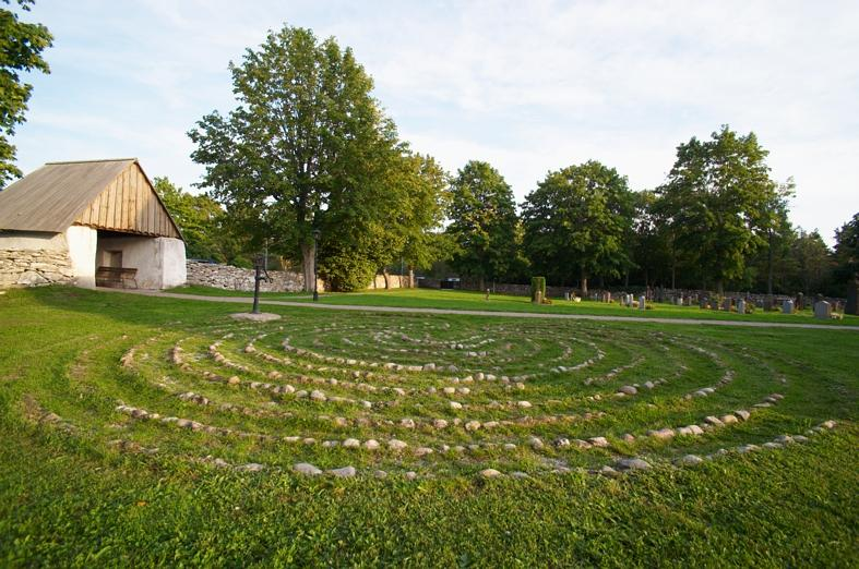 Belägen på Fröjels kyrkogård. Renoverades 1974. Östra stigluckan till vänster. Motiv: Fröjel 10:1 Kategori: Labyrint Belägen på Fröjels kyrkogård. Renoverades 1974. Östra stigluckan till vänster. Fröjel 10:1.